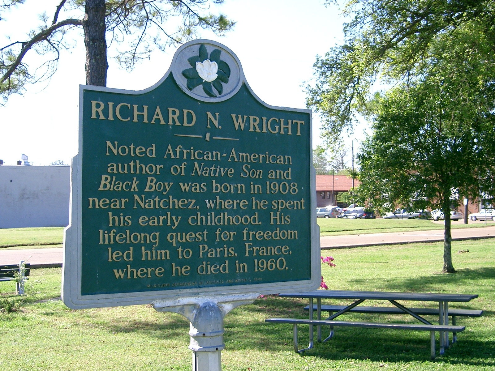 Richard Wright (Auteur de Black Boy) - Plaque souvenir sur les berges du Mississipi à Natchez dans l'Etat du Mississippi. self made PRA